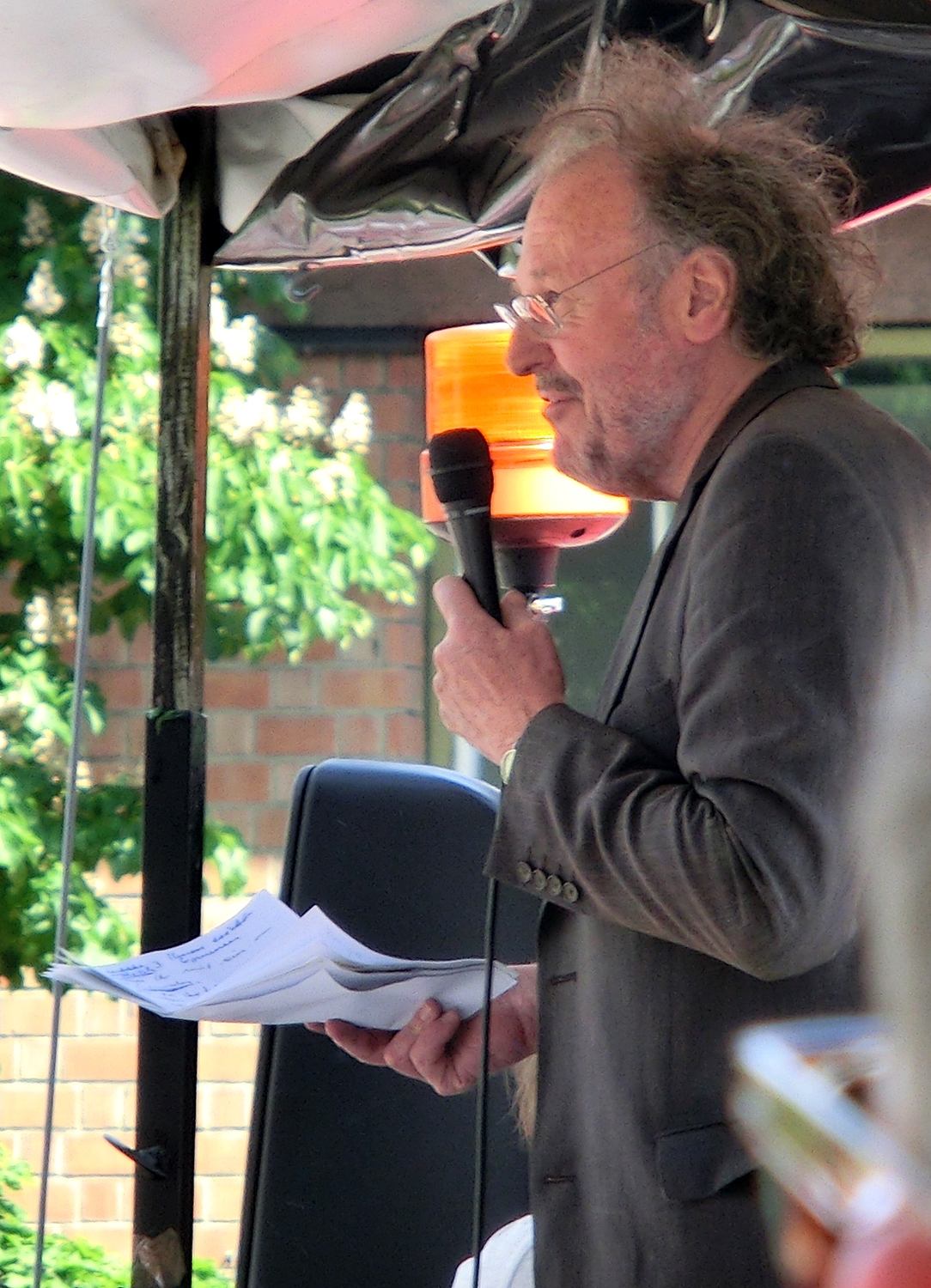 Prof. Dr. Jürgen Wertheimer (* 1947), deutscher Hochschullehrer für Neuere Deutsche Literaturwissenschaft und Komparatistik an der Eberhard Karls Universität Tübingen und Autor, als Redner bei der Tübinger Demonstration gegen Bildungskürzungen am 21. Mai 2014.